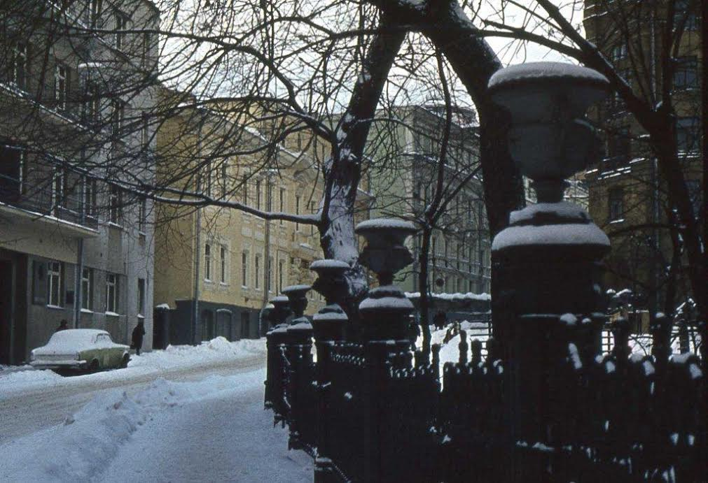 ул. Неждановой (ныне Брюсов переулок), 1983